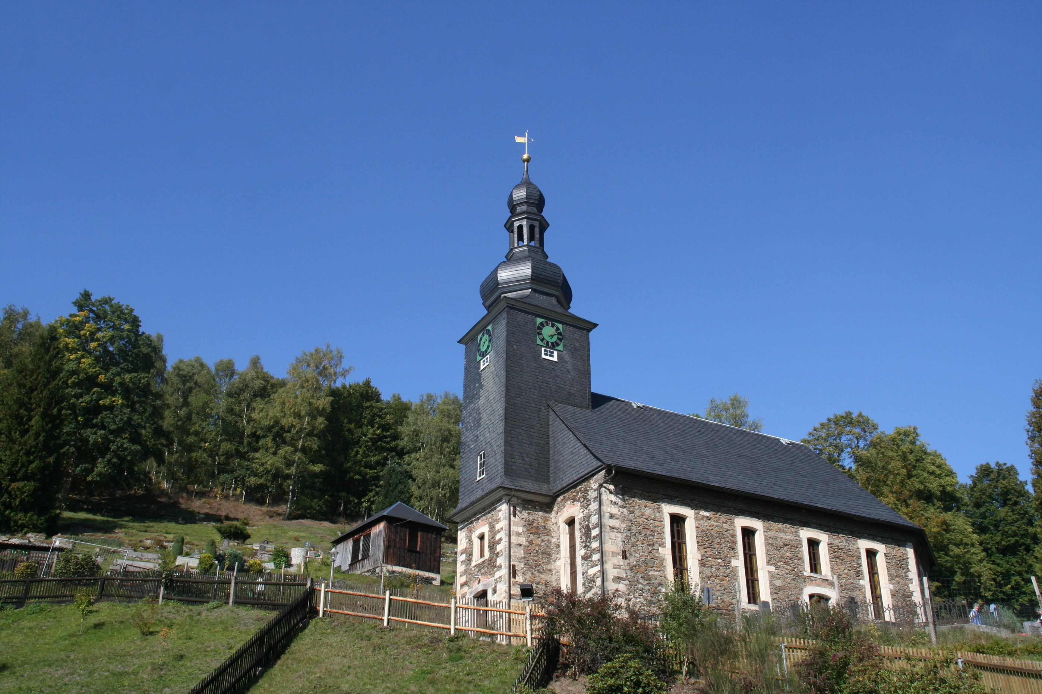 Ev. Kirche in Oelze (Katzhütte), Thüringen